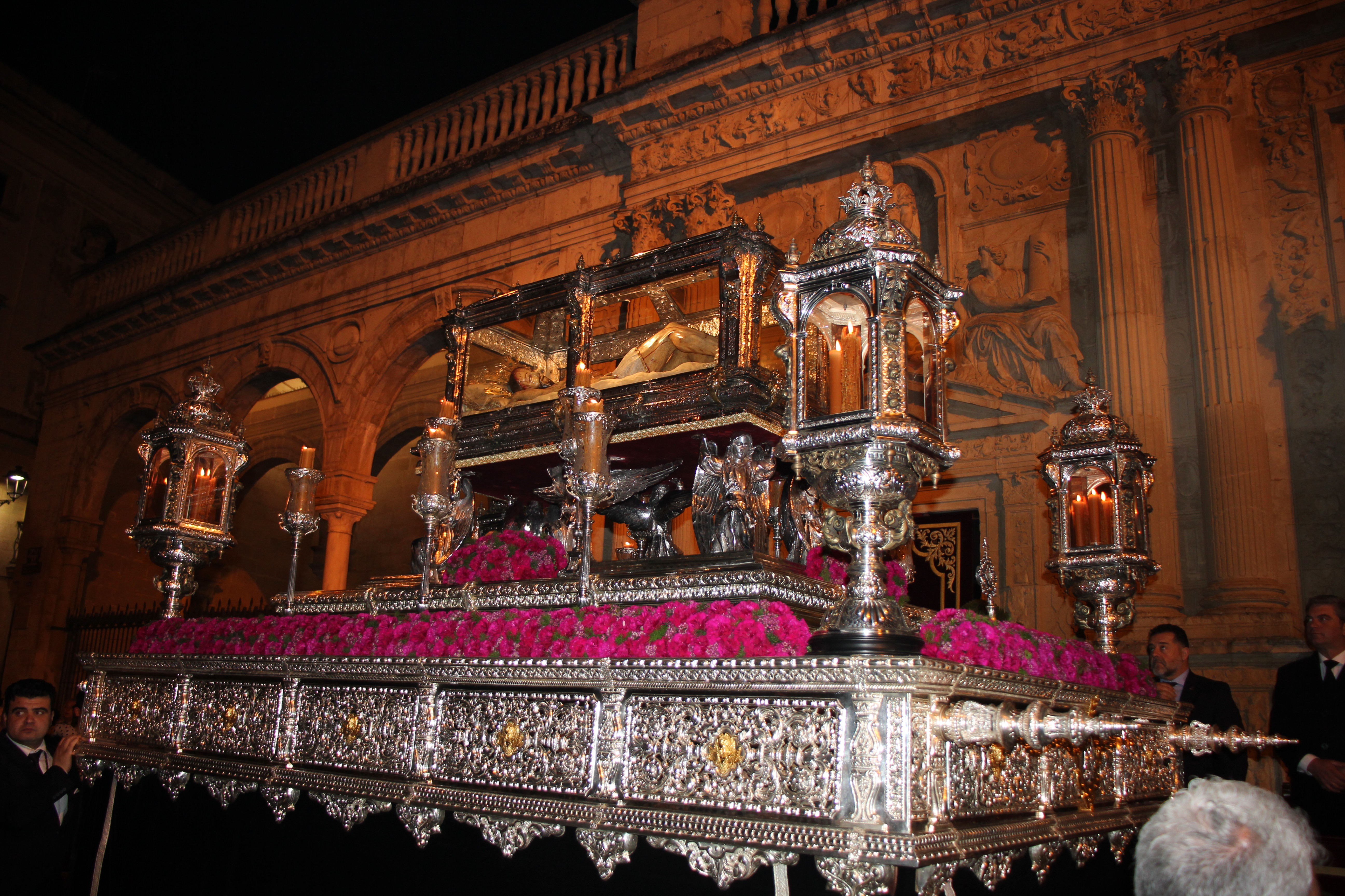 Hermandad del Santo Entierro (Jerez)